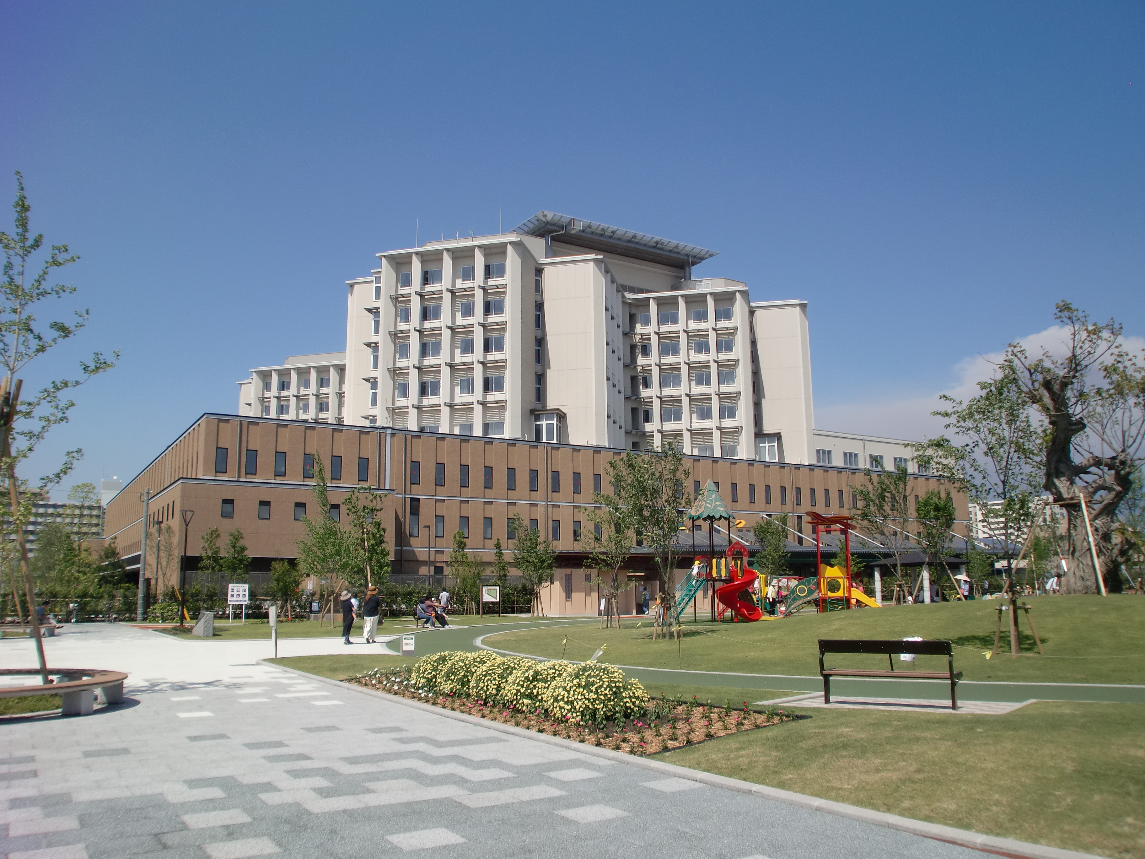 鹿児島市立病院を隣接する上荒田の杜公園から望む。